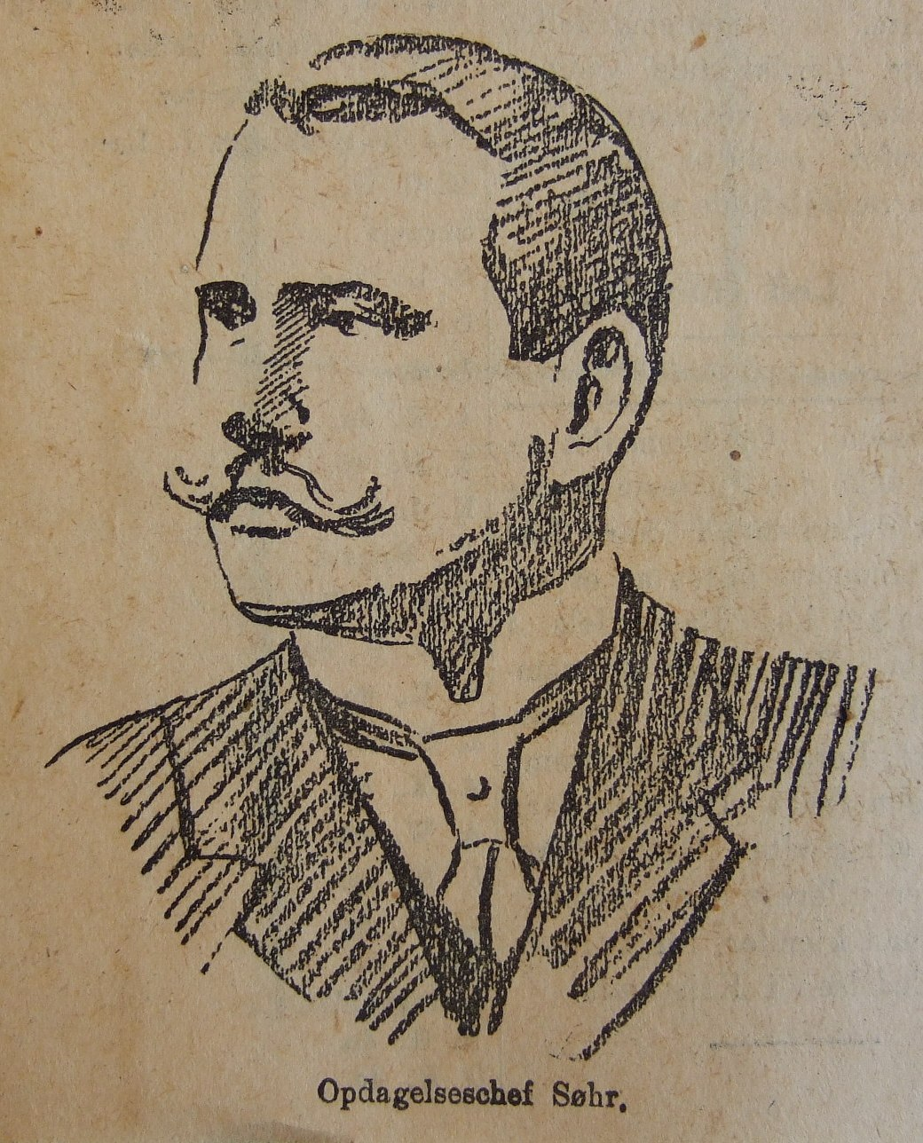 Politimester Joh. Søhr